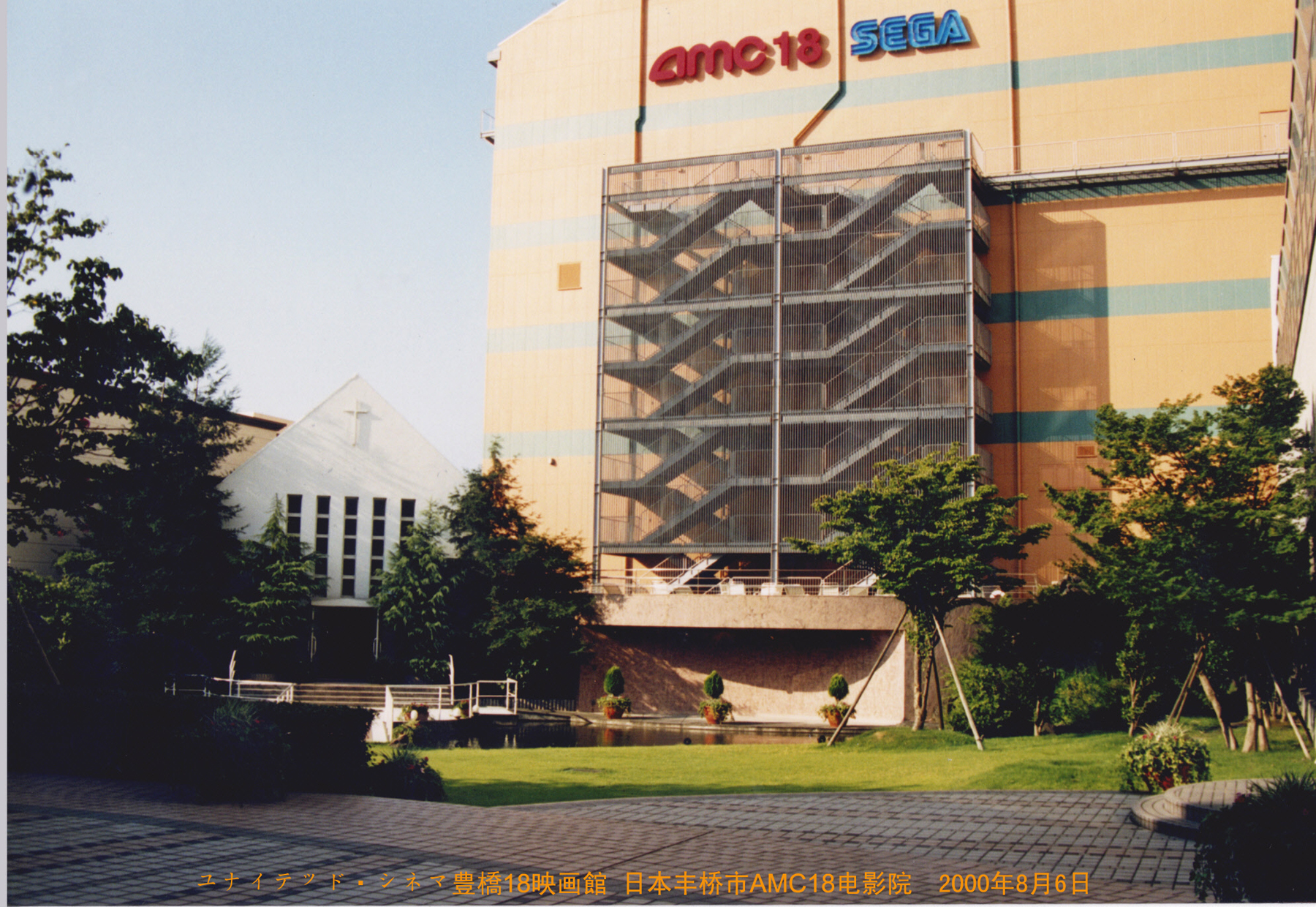 AMCホリディ・スクエア18。ユナイテッド・シネマ豊橋18の前身。